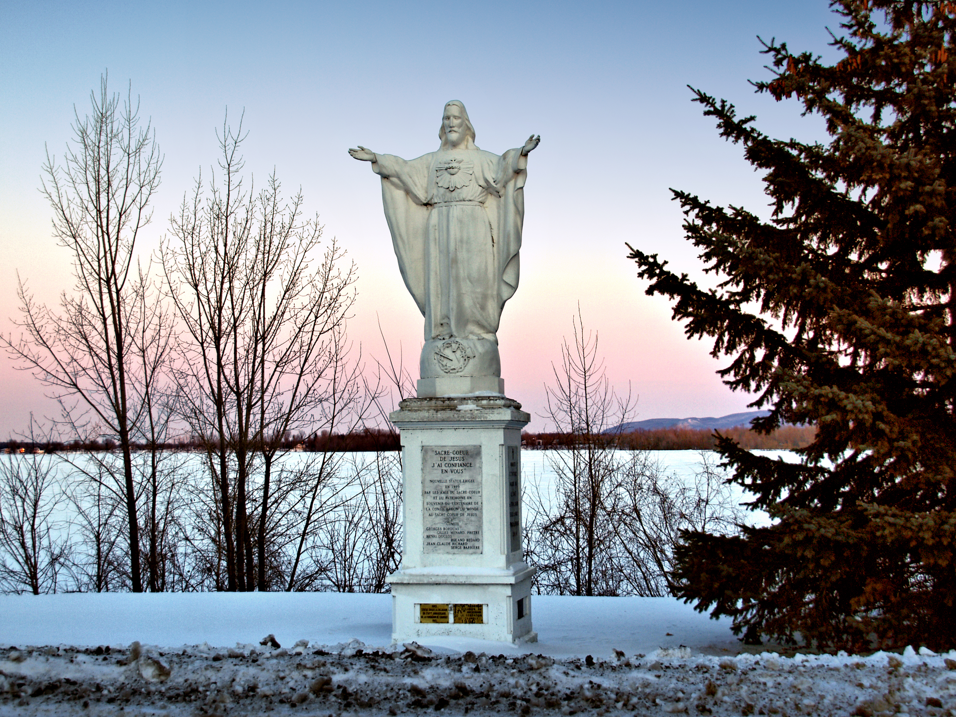 Chambly, Montérégie (Québec) - Statue du Sacré-Cœur de Jésus face à l'église Saint-Joseph de Chambly